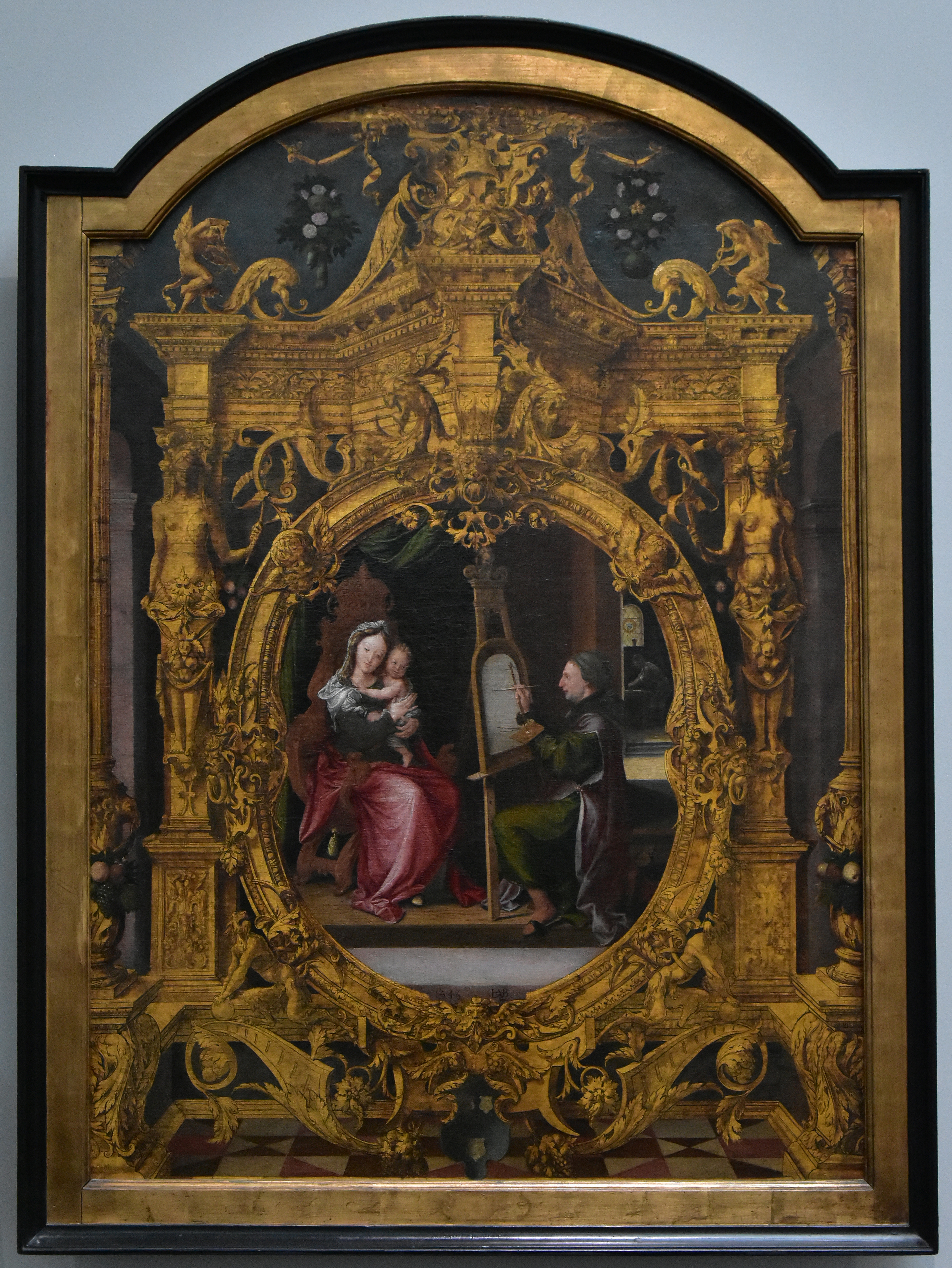 Lanceloot Blondeel (1496-1561) Heilige Lucas schildert de Madonna (1545) Groeningemuseum 26-12-2019